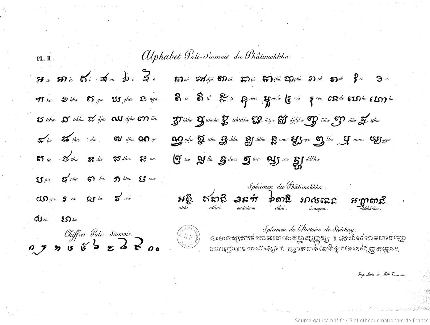 L’Alphabet Pali, collection des planches, planche 2, page 6.